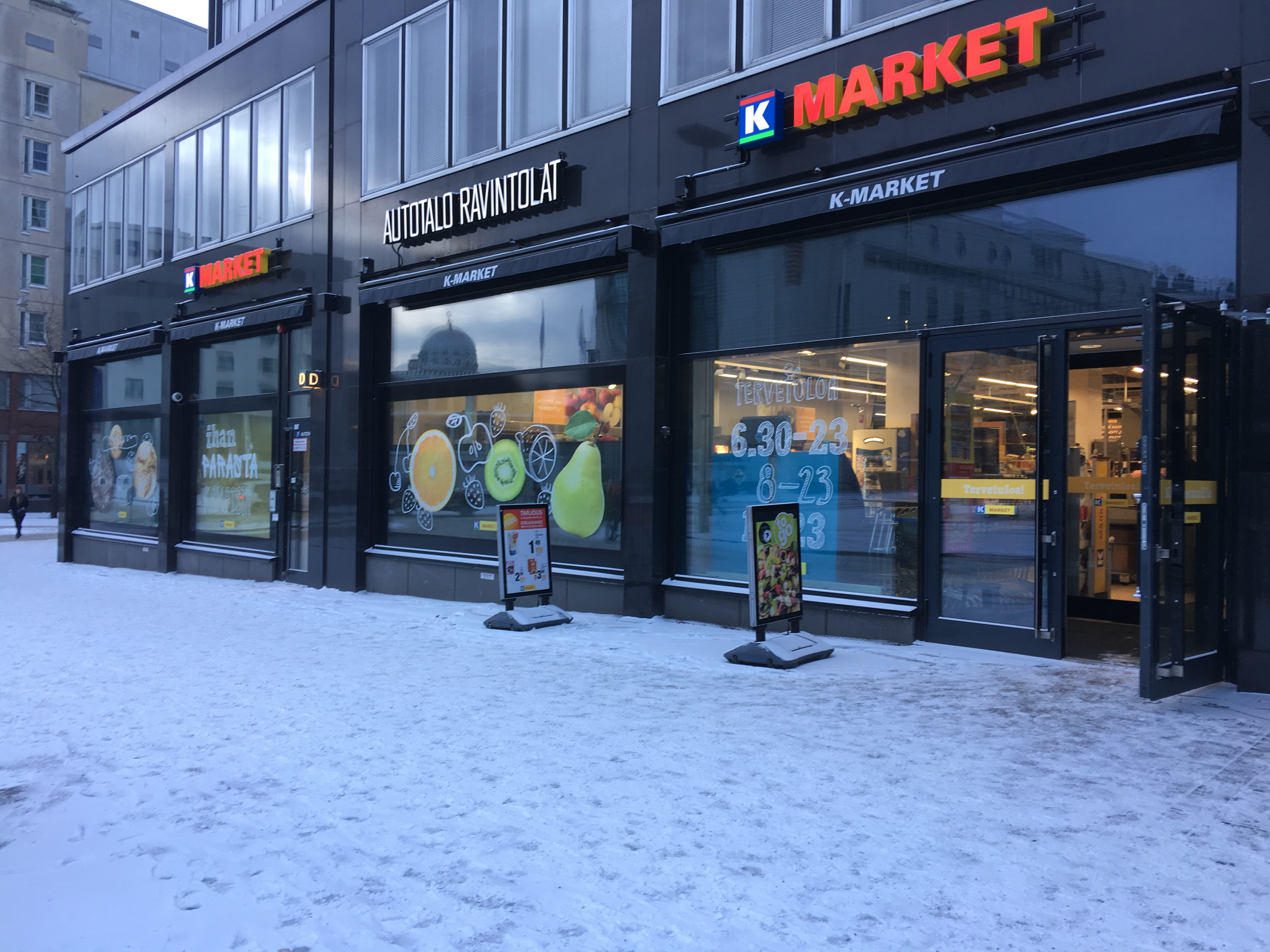 K-market Salomonkadulla Helsingissä.